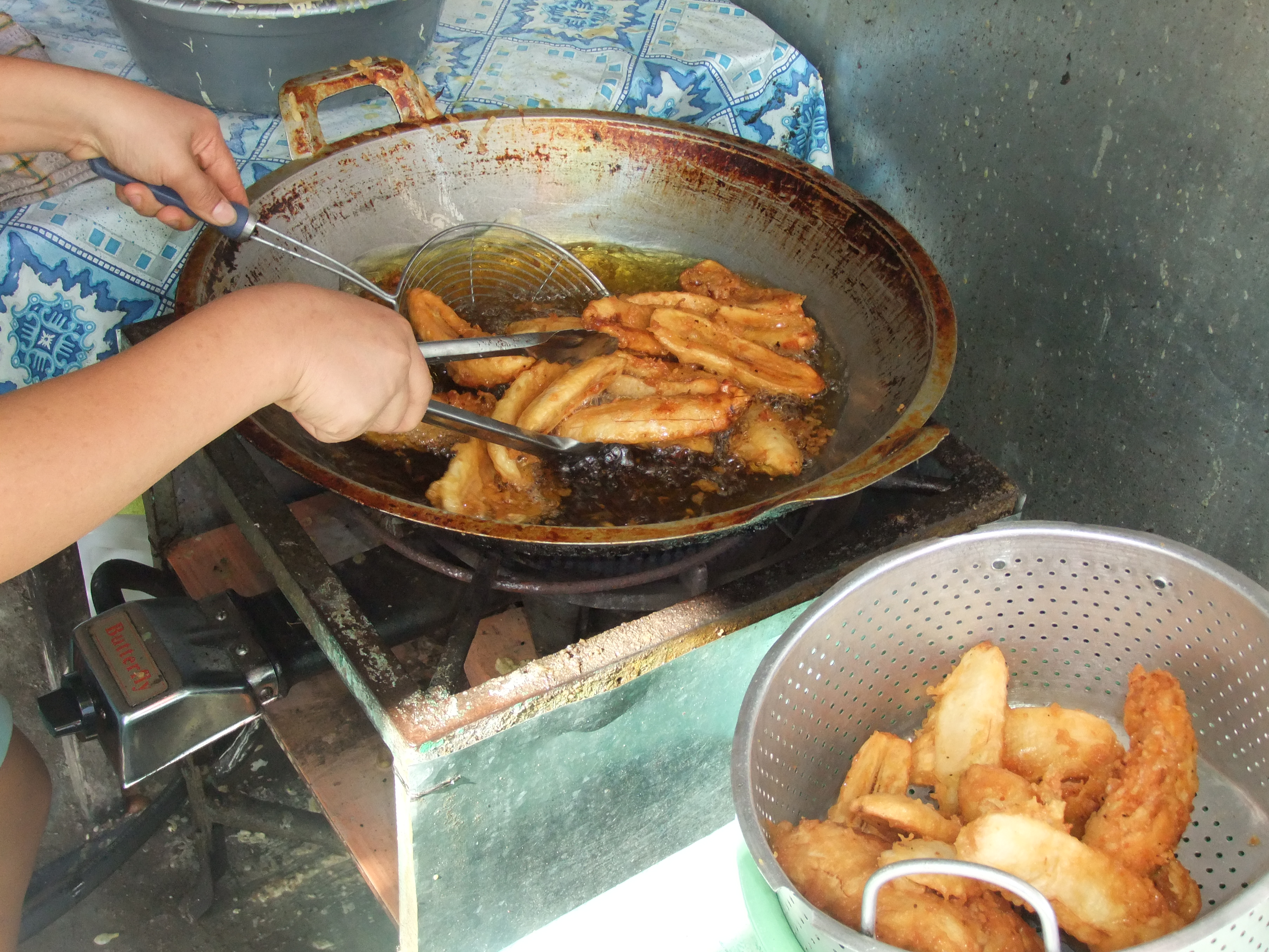 Pisang Goreng, market in Rantepao